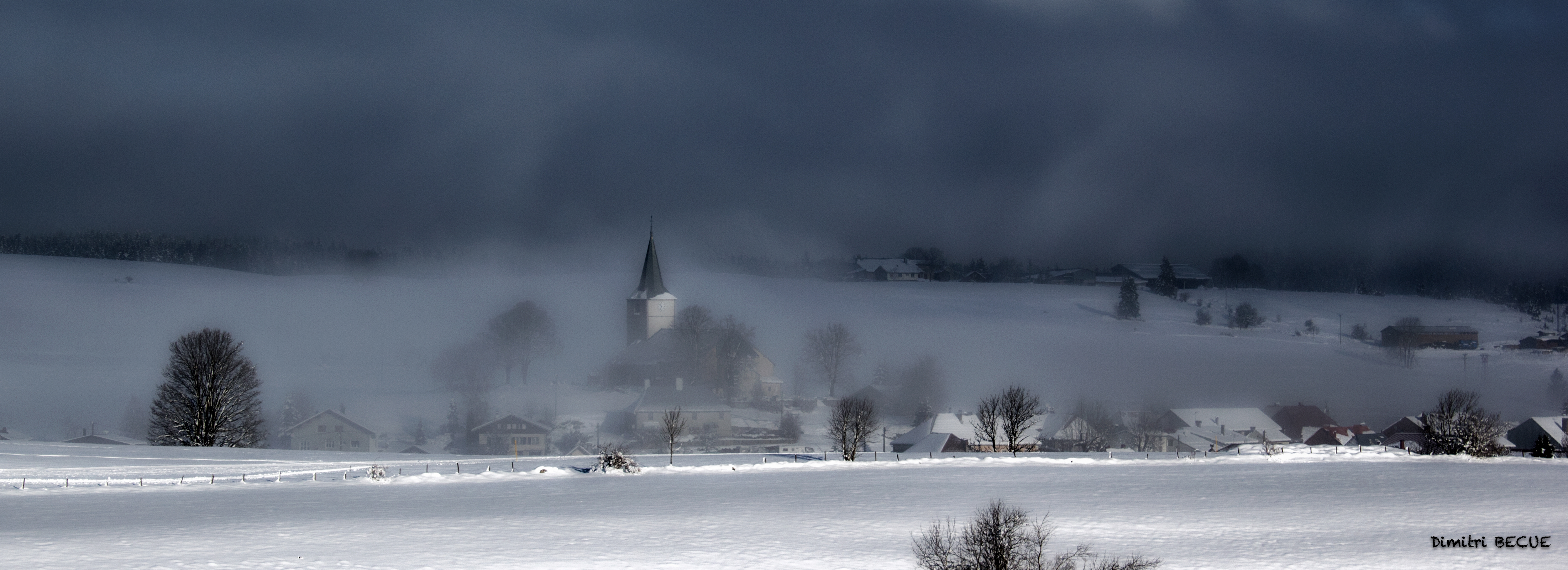 Village de Chaux-Neuve dans le Doubs Franche comté France